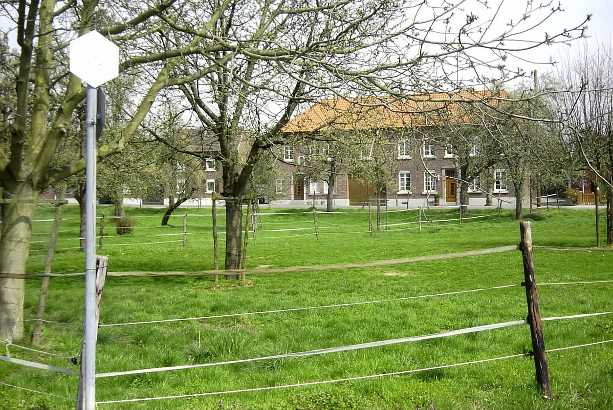 Summary Bildbeschreibung: Tenholter Dorfanger Quelle: eigenes Foto Fotograf/Zeichner: bodoklecksel 17:25, 21. Apr 2006 (CEST) Datum: April 2006. Sonstiges: ...